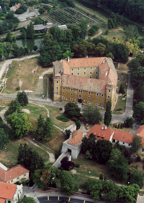 Castle - Mosonmagyaróvár - Hungary - Europe